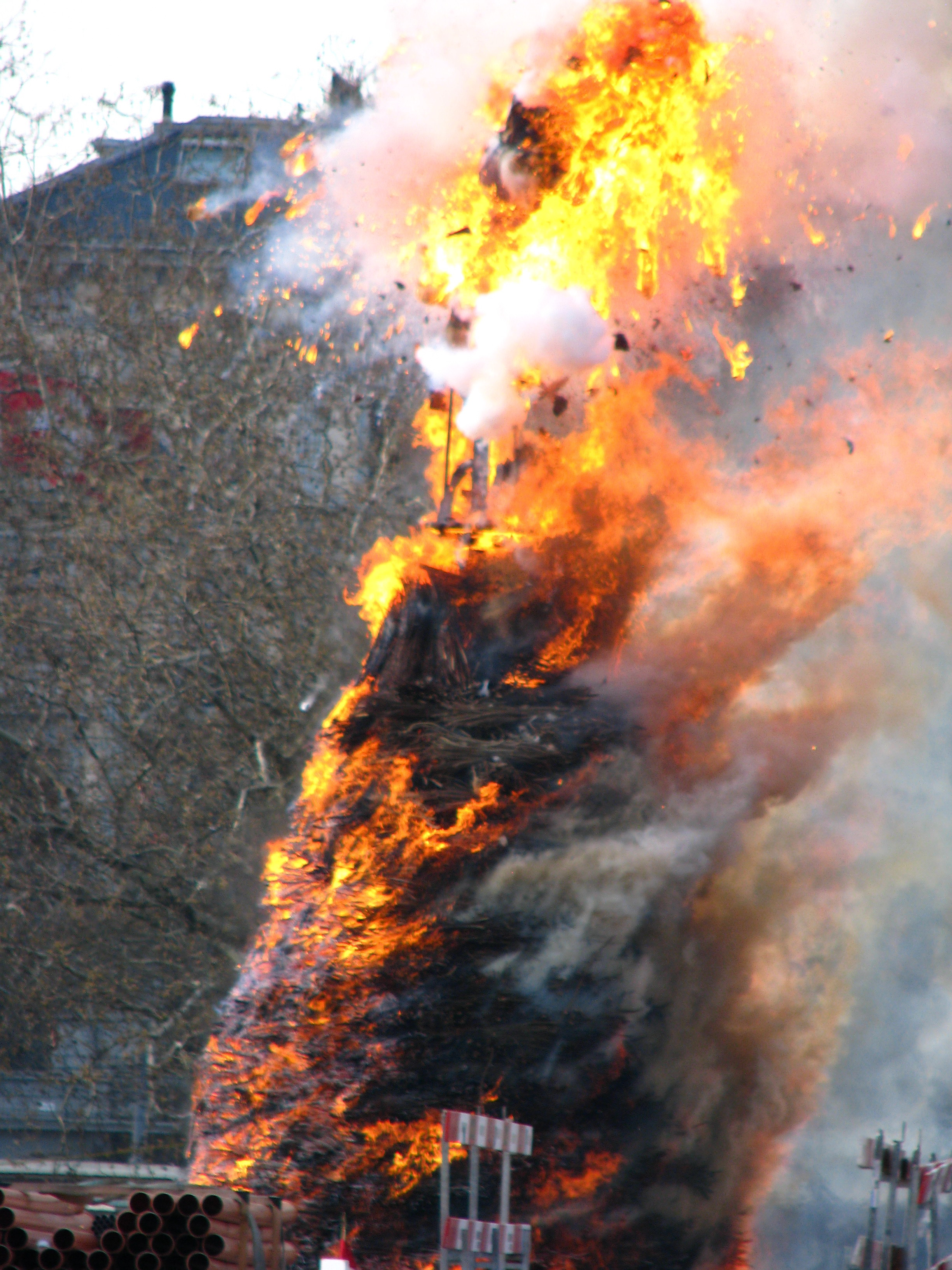 Sechseläuten on April 19, 2010, in Zürich (Switzerland)